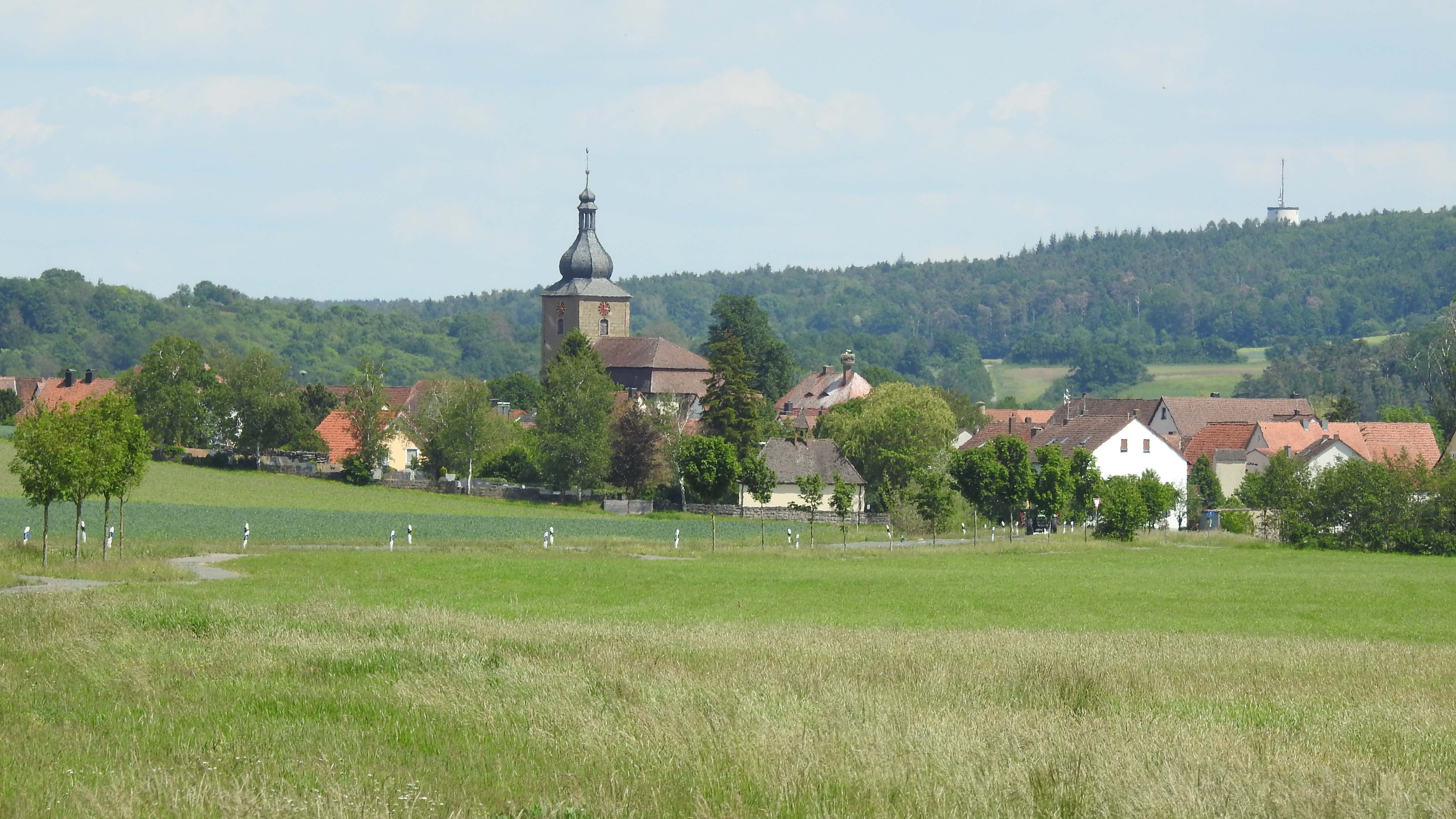 Schauerheim, Neustadt an der Aisch, von Westen